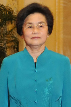 El Presidente de la República, Sebastián Piñera, participó en la ceremonia de Recepción Oficial en el Palacio del Pueblo.